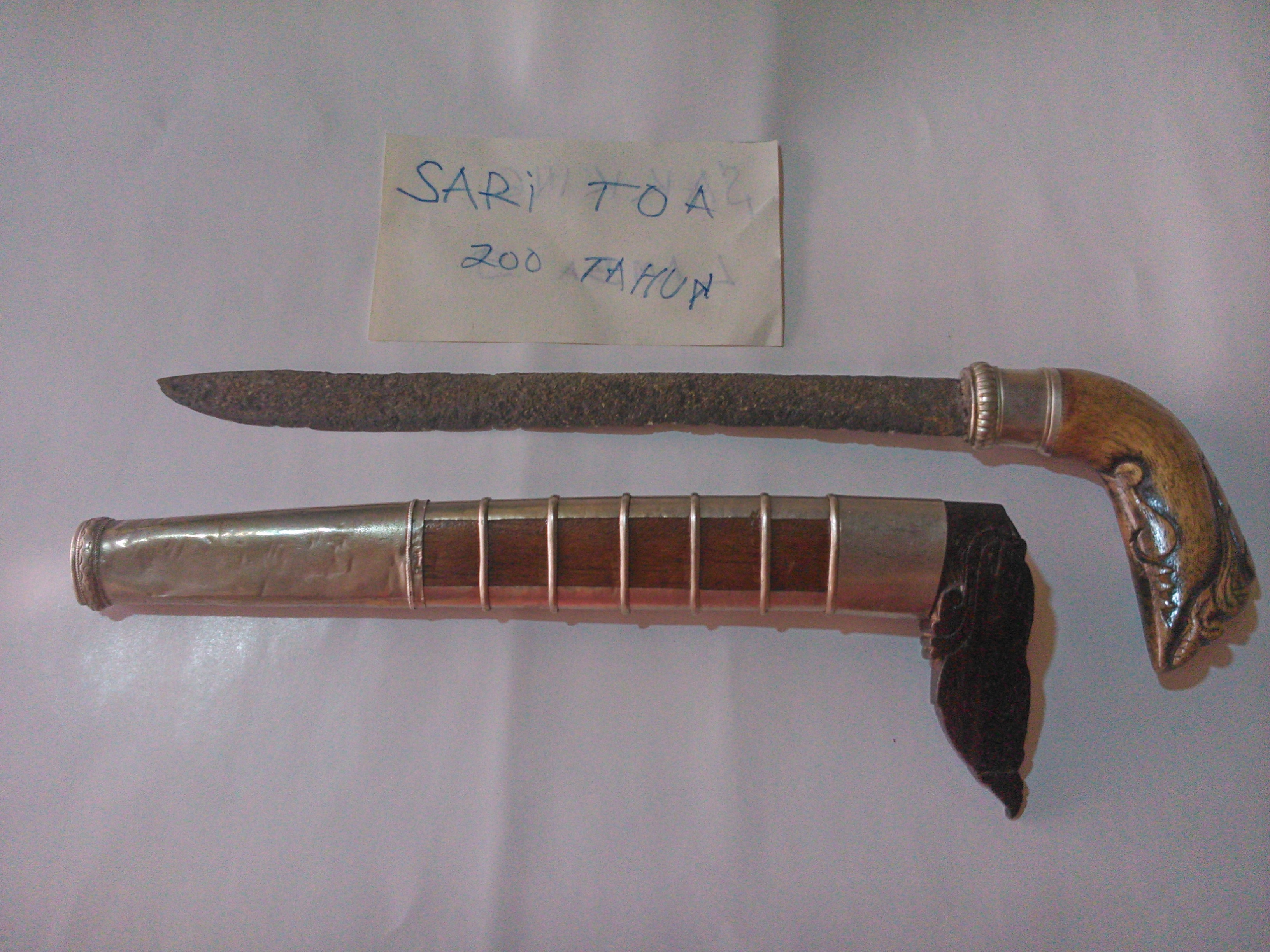 Badik